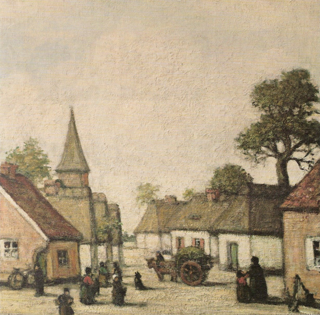 Jakob Smits, schilderij Het Gehucht, museum Jakob Smits te Mol, Belgie, olieverf/doek 105 x 100 cm